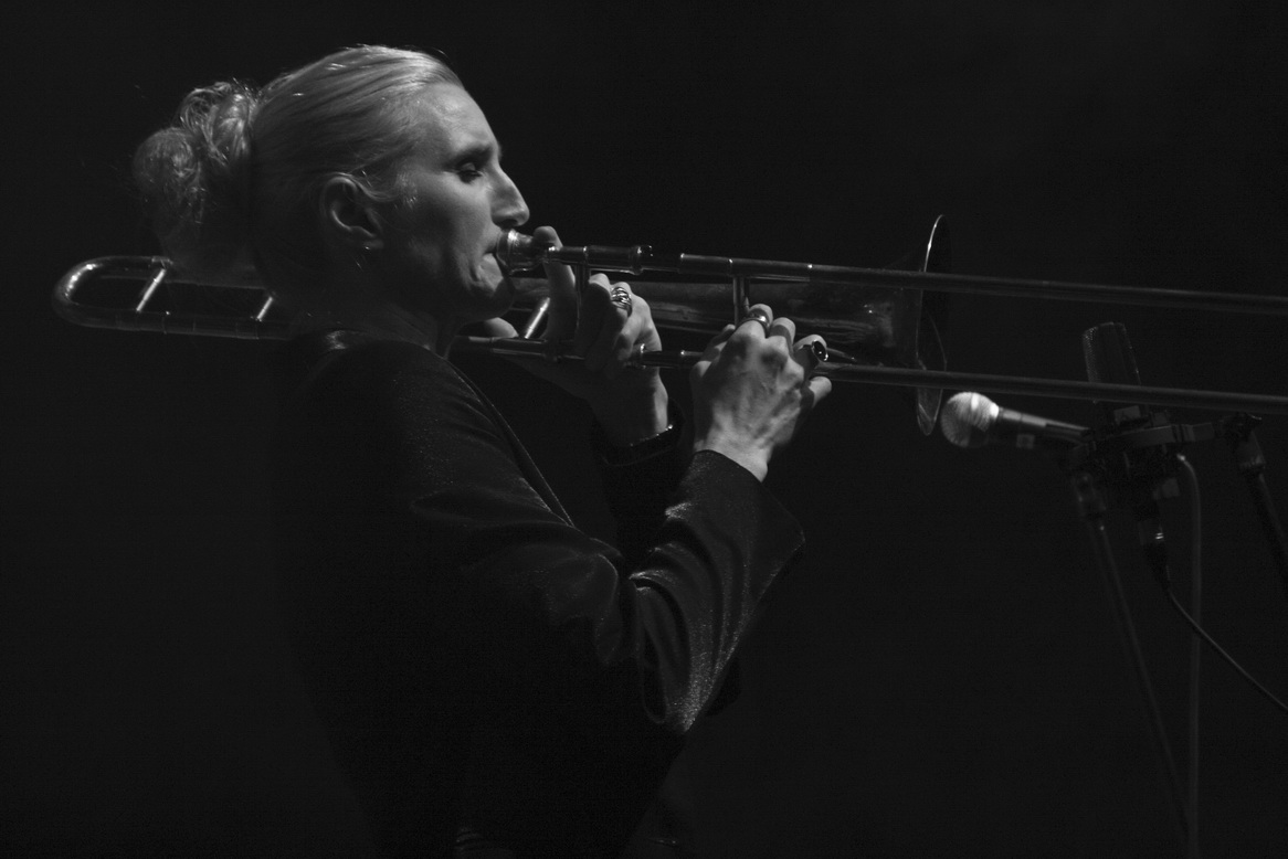 Karin Hammar auf dem St. Ingberter Jazzfestival